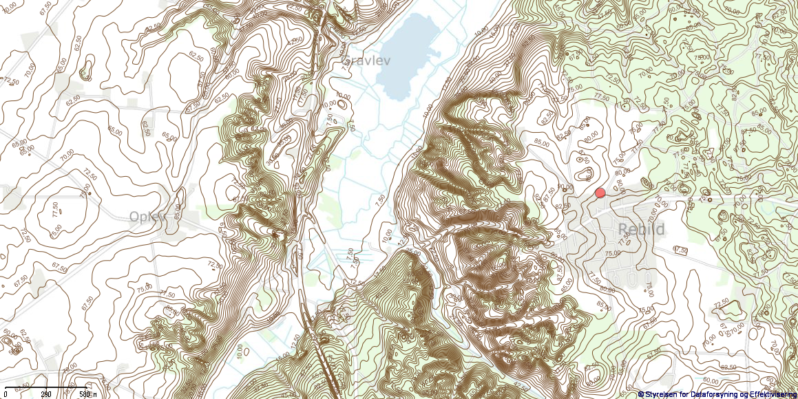 lavet fra SDFE-kortviewer med grundkort og 2,5m højdekurver